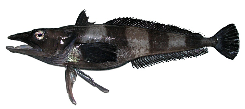 Chionobathyscus dewitti Andriashev et Neyelov, 1978; spent female, 43 cm TL, Ross Sea, 15 February 2010